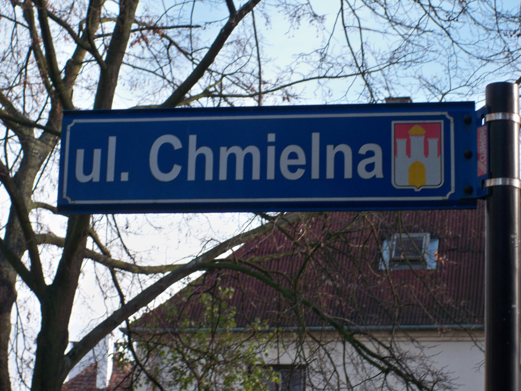 Tablica z nazwą ulicy we Włocławku (ul. Chmielna, 2009 r.)